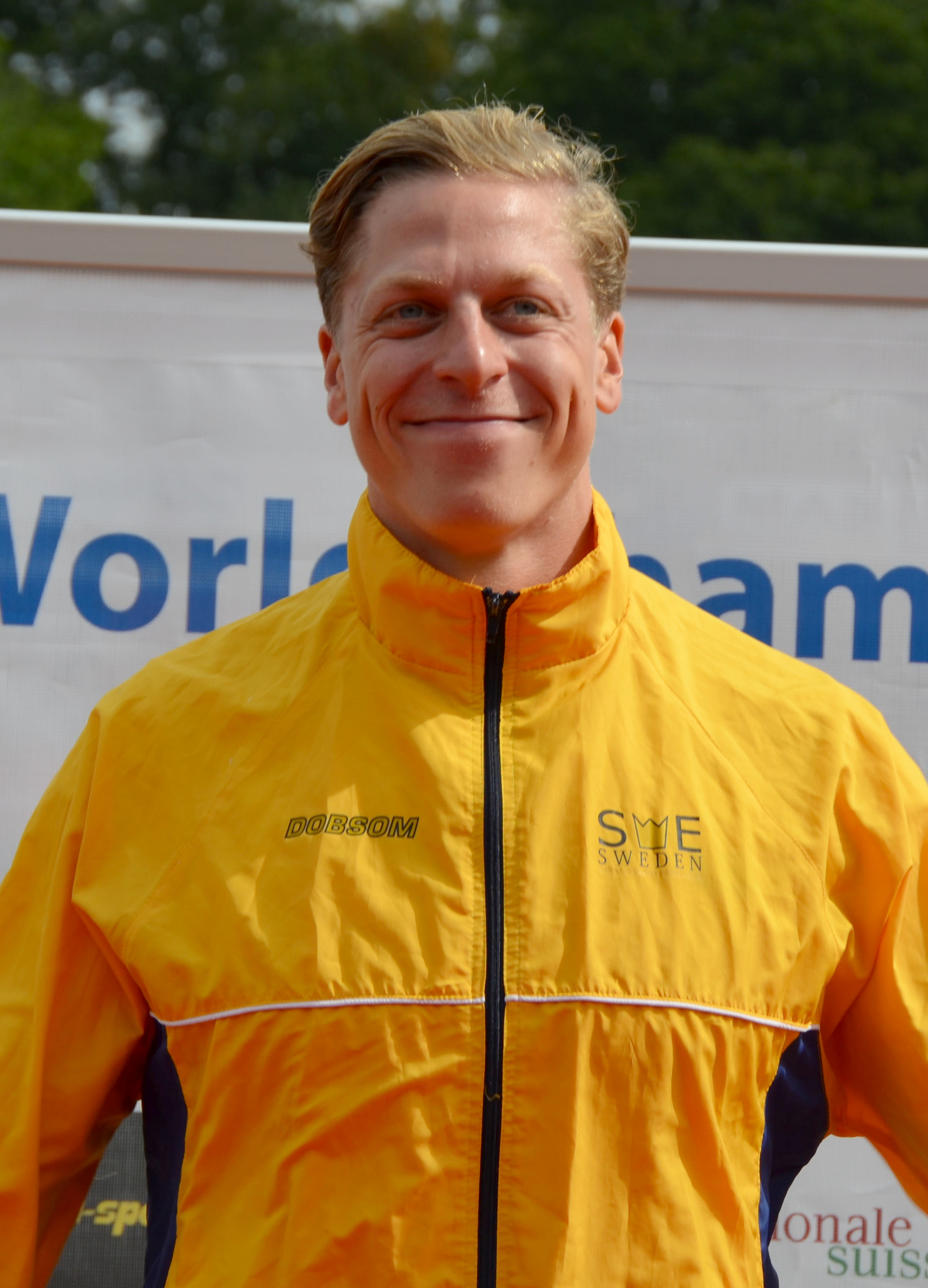 2013 ICF Canoe Sprint World Championships in Duisburg - Alle Ergebnisse/Teilnehmer unter: Gewinner:SWE - SWEDEN ÖSTRÖM, Petter CAN - CANADA DE JONGE, Mark ESP - SPAIN CRAVIOTTO RIVERO, Saúl